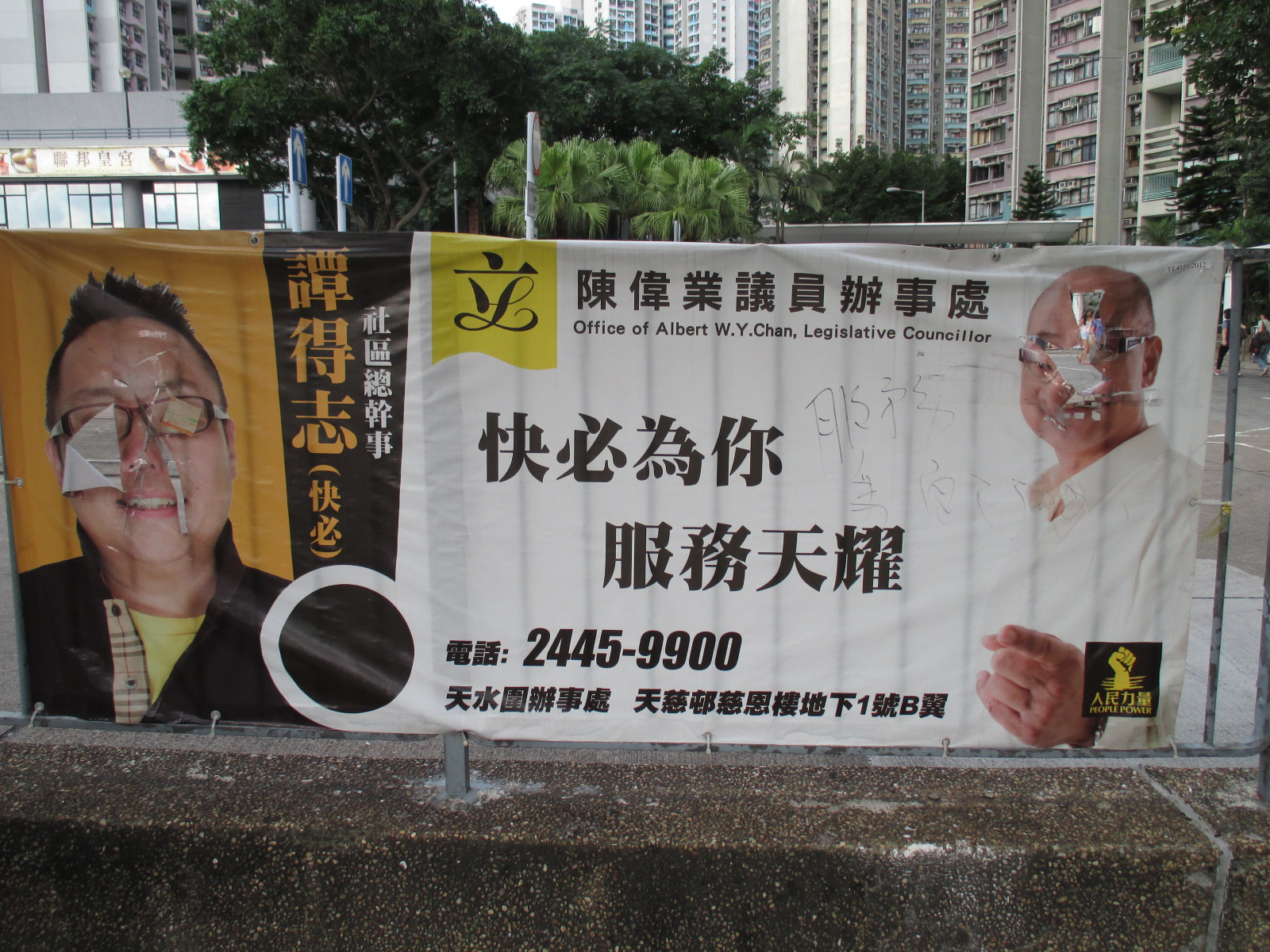 中文（香港）: 譚得志成為人民力量新界西天水圍社區總幹事。宣傳橫額遭受破壞。